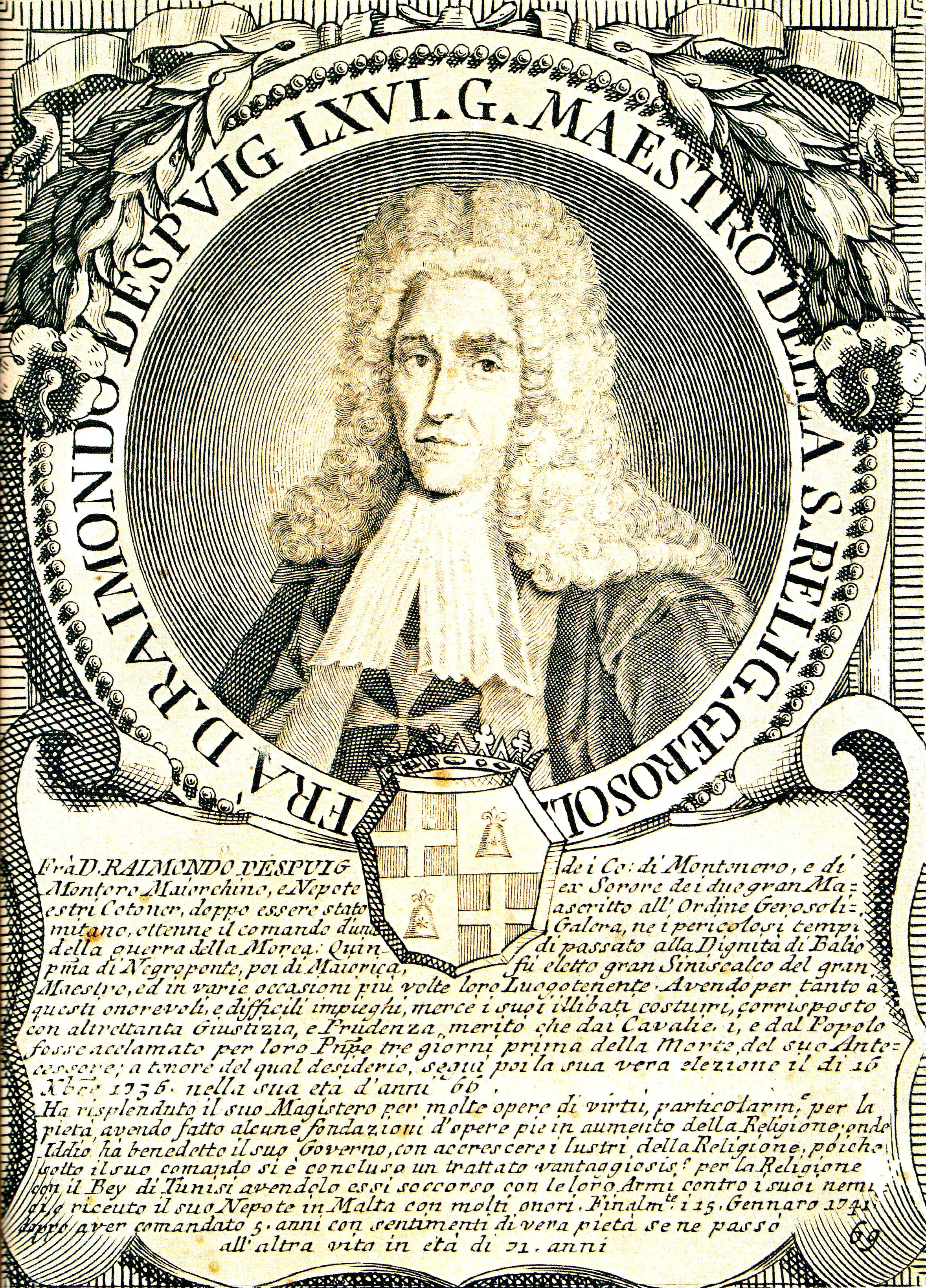 Grand maître de l'Ordre